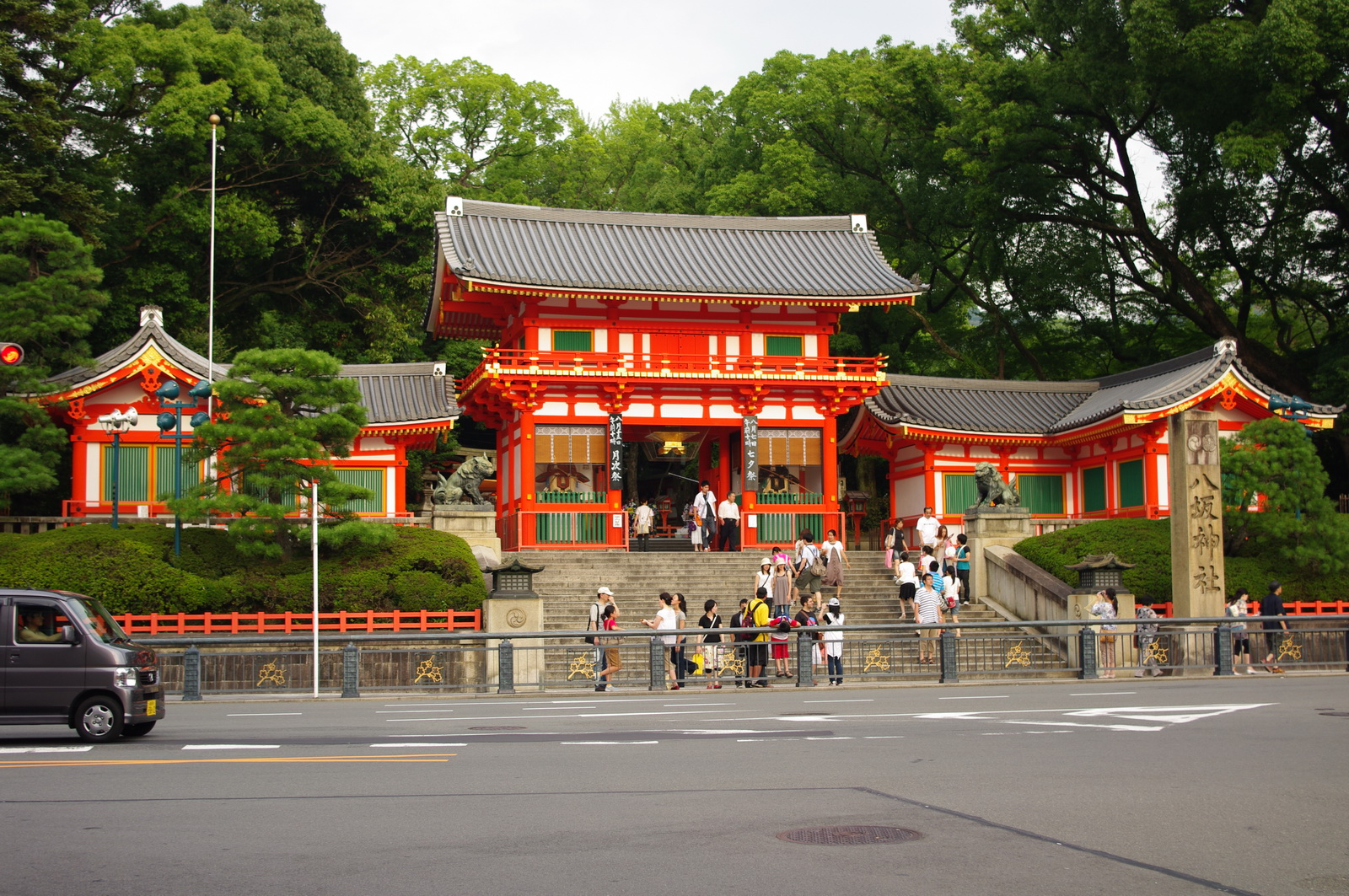 Aufgang zum Yasaka-Schrein beim Bezirk Gion